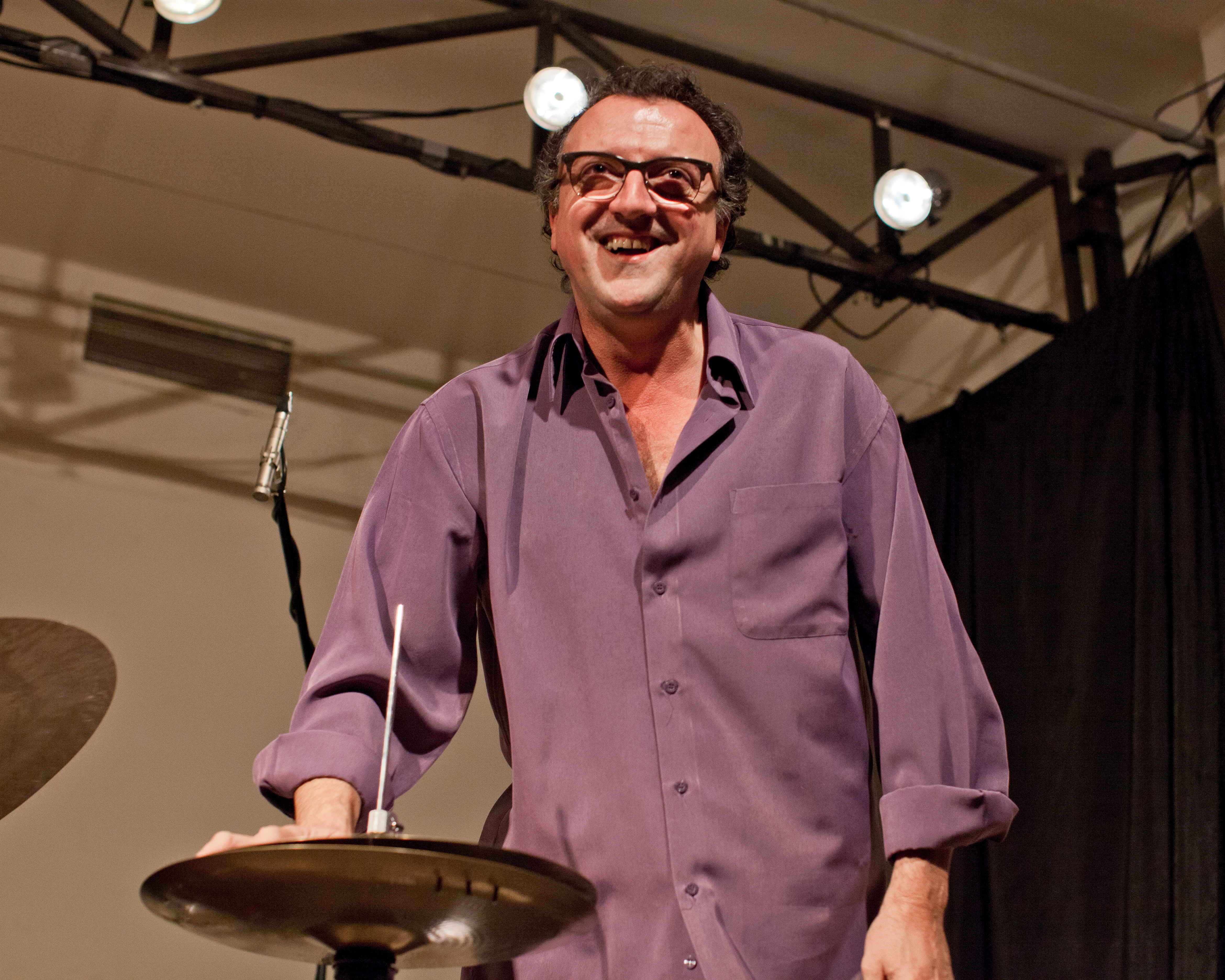 Aurora Trio (Barry Guy, Agustí Fernández, Ramon Lopez) in Moscow